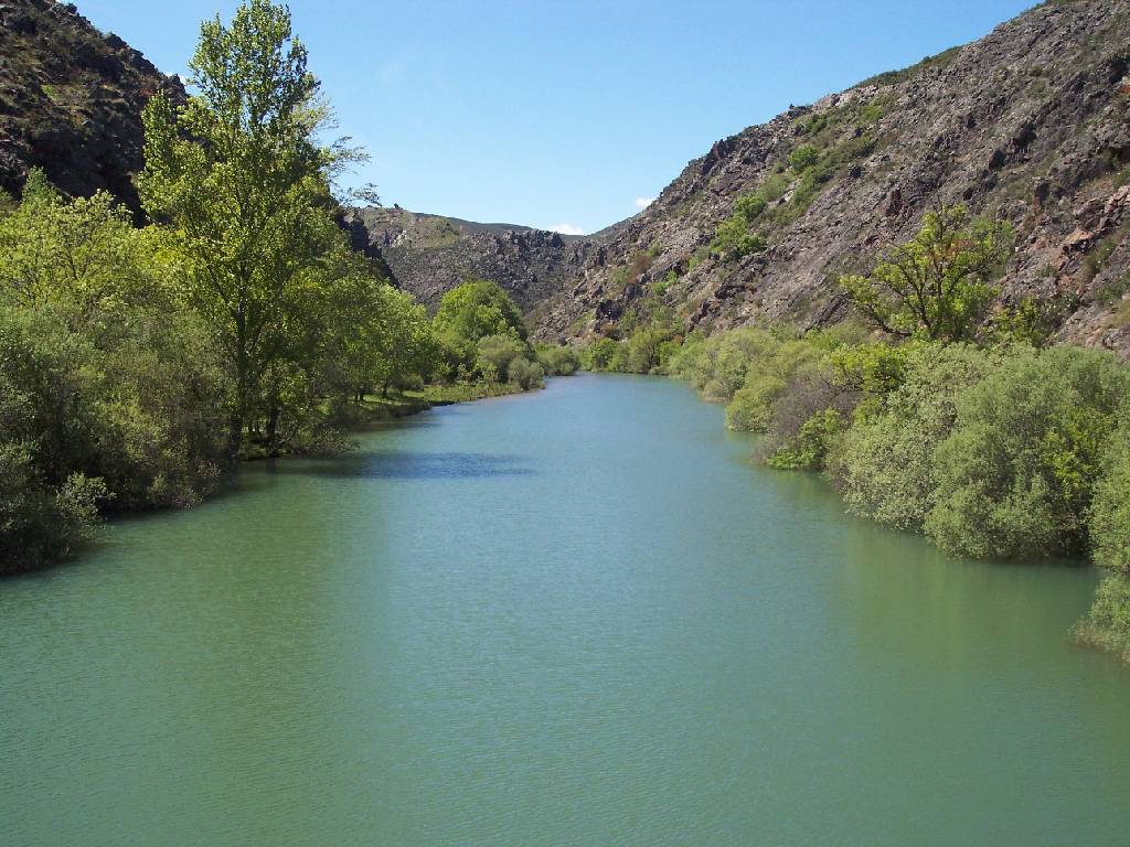 Río Lozoya a su paso por El Atazar